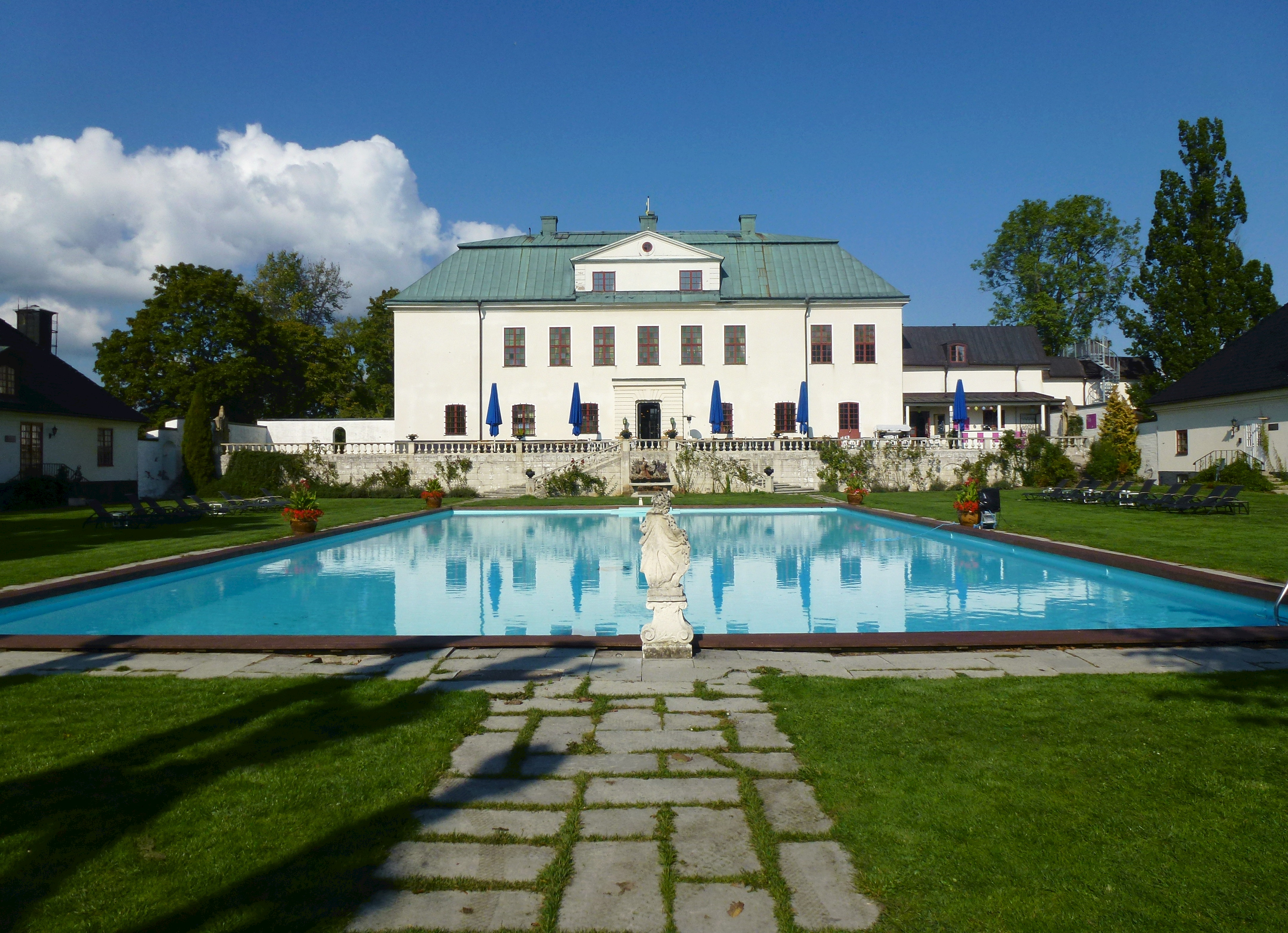 Häringe slott, sydfasad